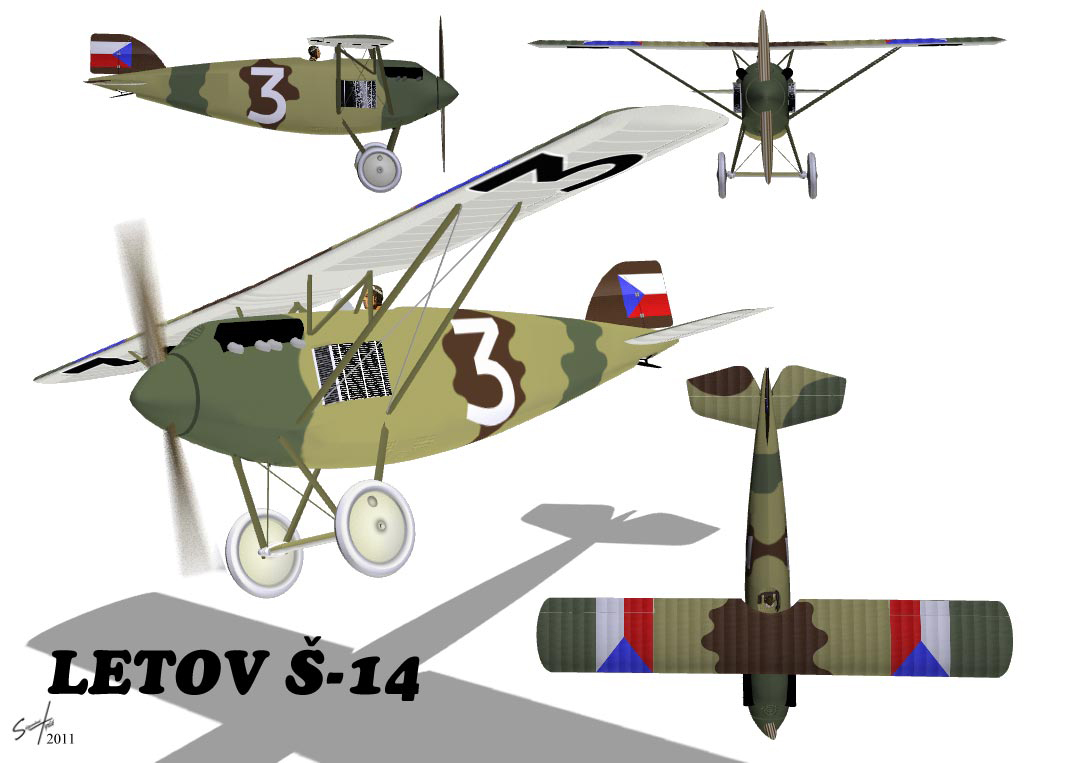 Letov Š-14 po přestavbě jako jednoplošný závodní tzv. "Parasol"